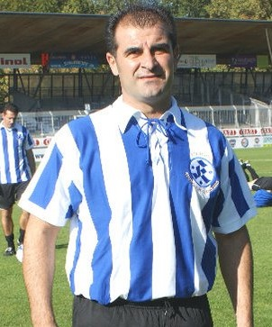 Dimitrios Moutas 2011 beim Jubiläumsspiel der Stuttgarter Kickers